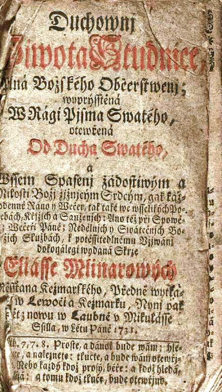 Duchovní života studnice by Eliáš Mlynarových